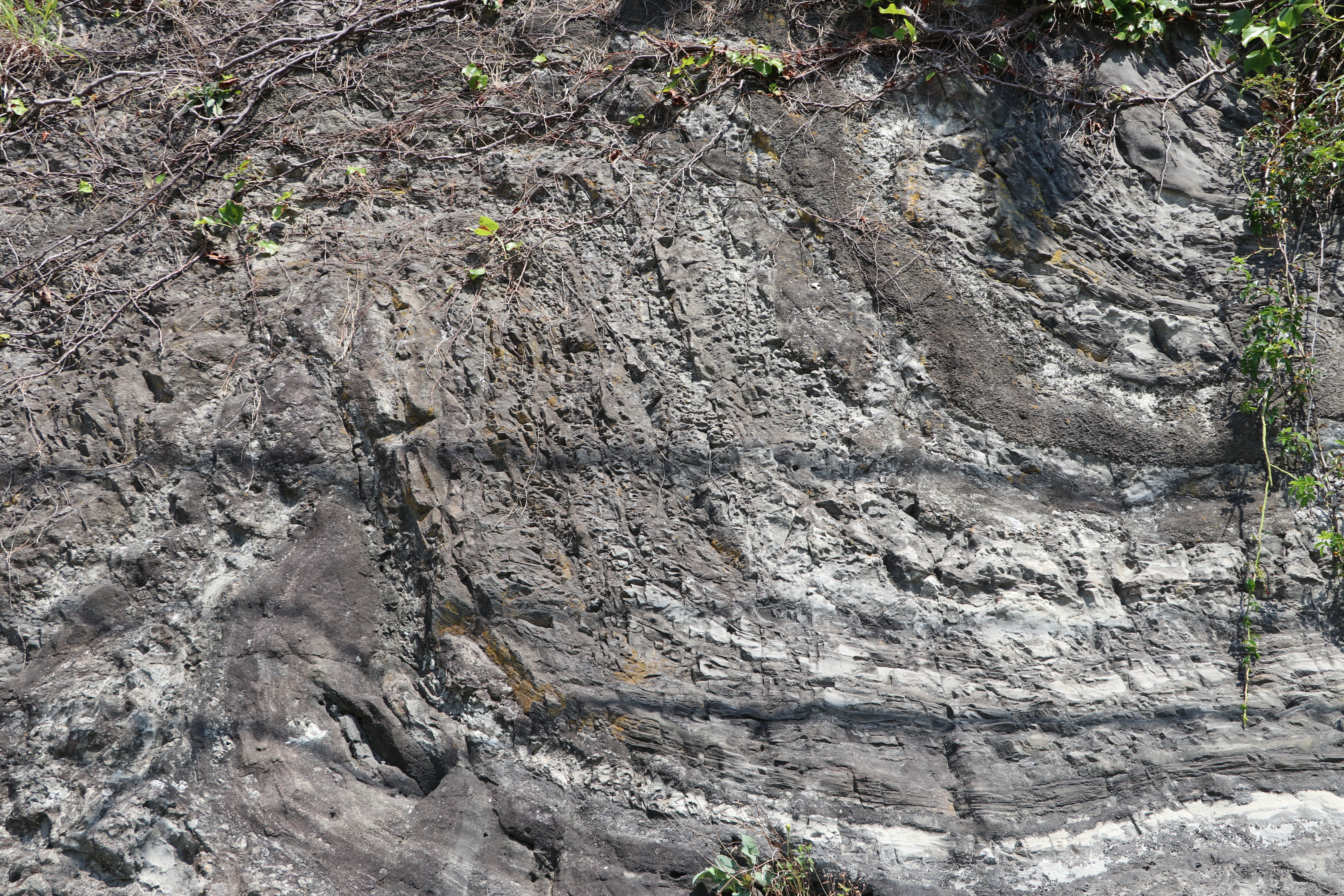 神奈川県指定天然記念物である「三浦市海外町のスランプ構造」ハンマーありバージョン: File:Miura City Kaito Slump Structure with hammer.jpg